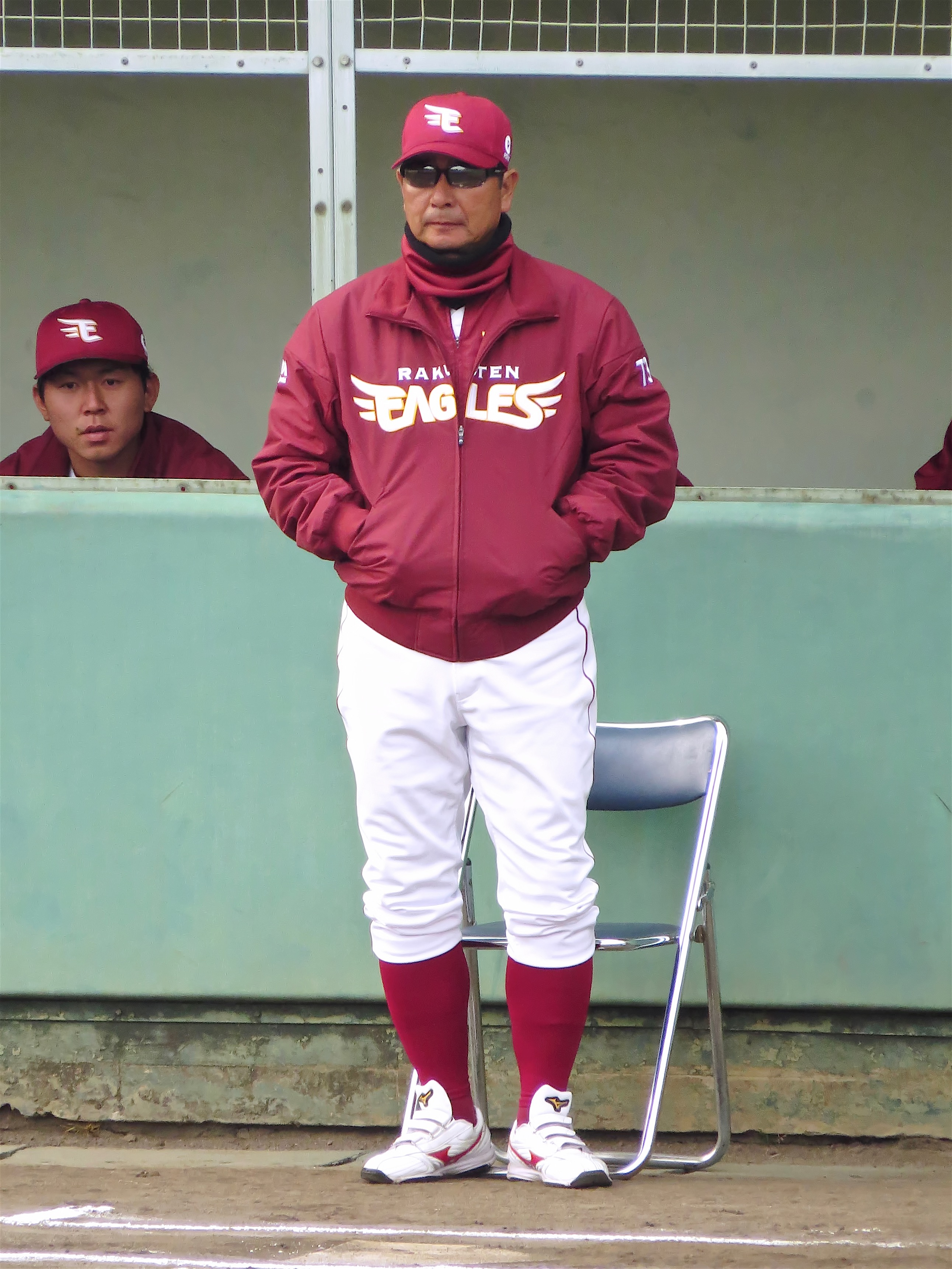 さいたま市営浦和球場にて